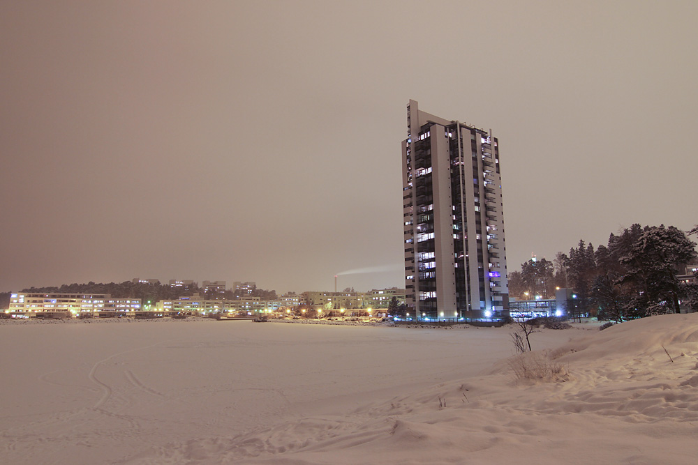 Kivenlahtea joulukuussa 2009, Meritorni